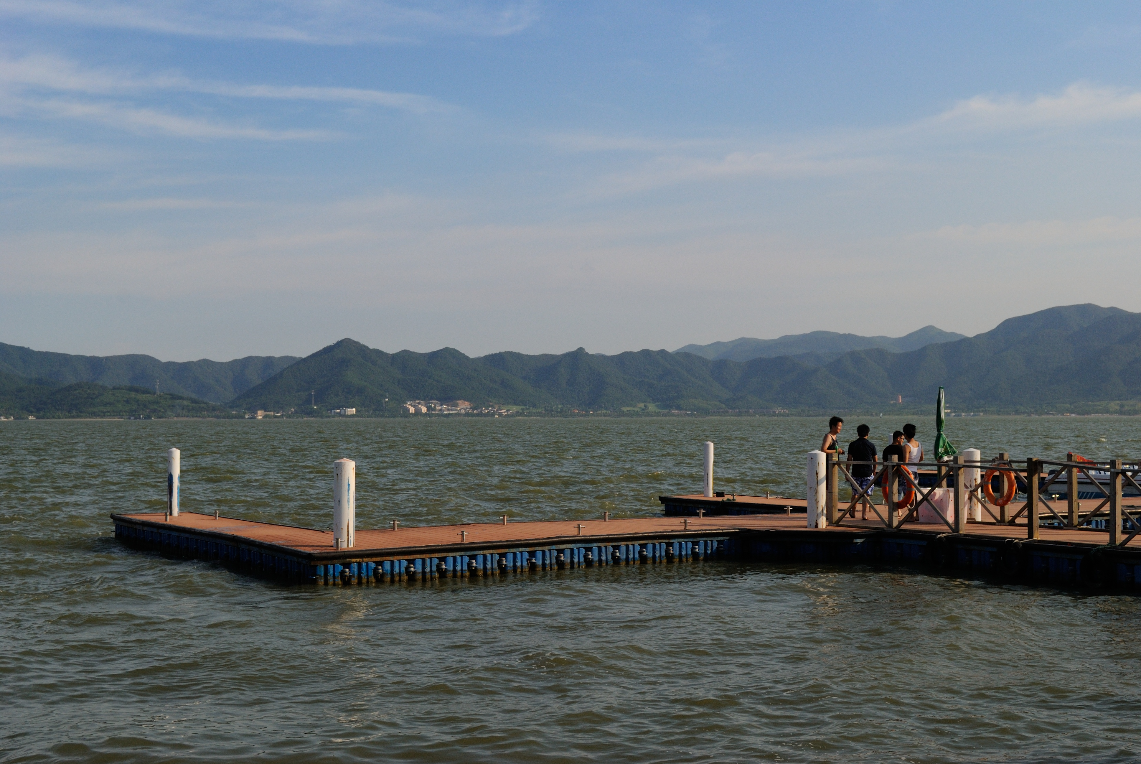 东钱湖边小码头